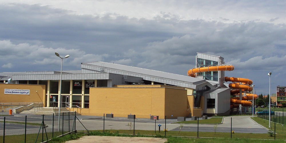 Budynek rypińskiego basenu.